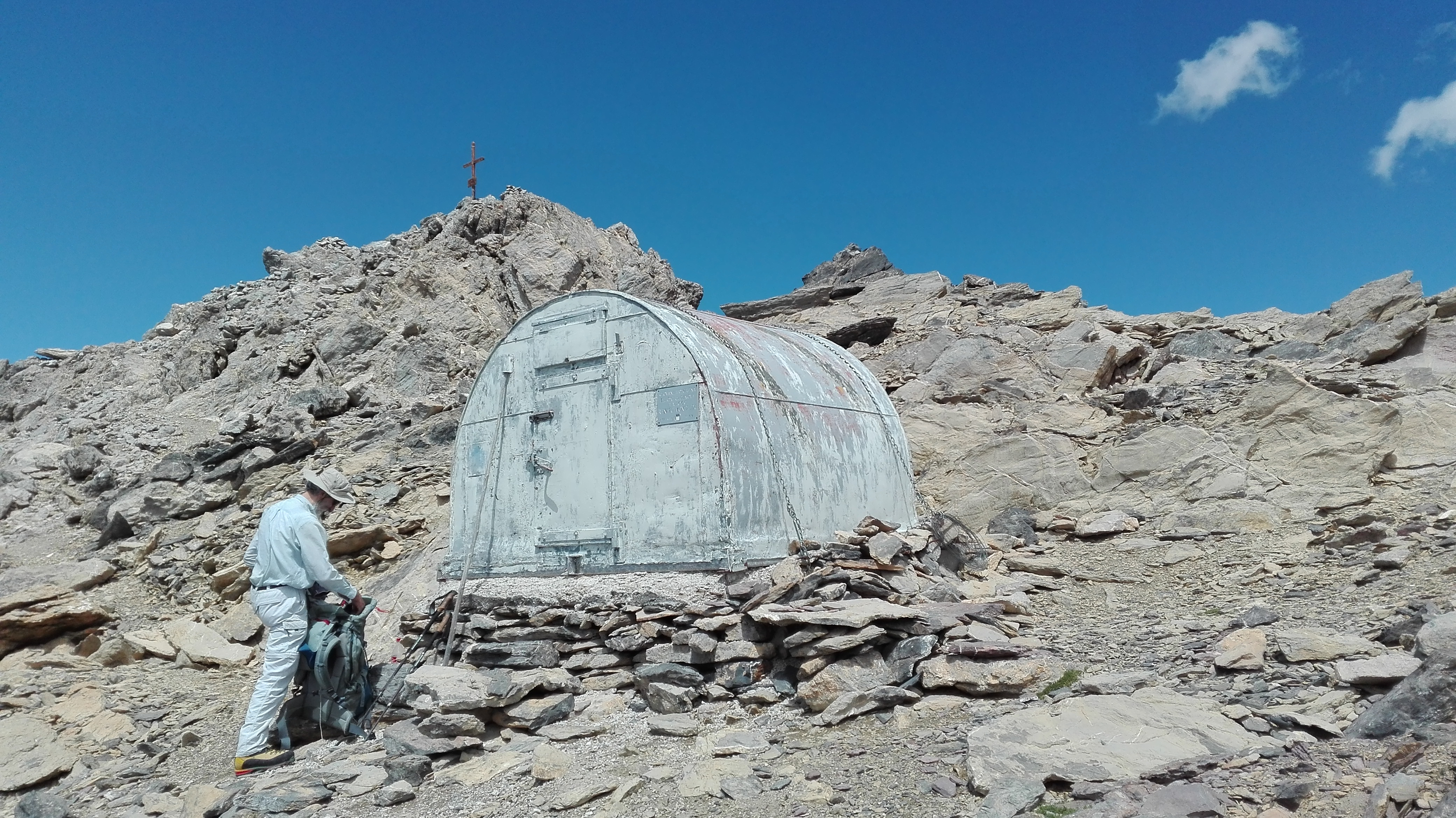 La croce di vetta del Buc de Nubiera con il bivacco Renato Montaldo.